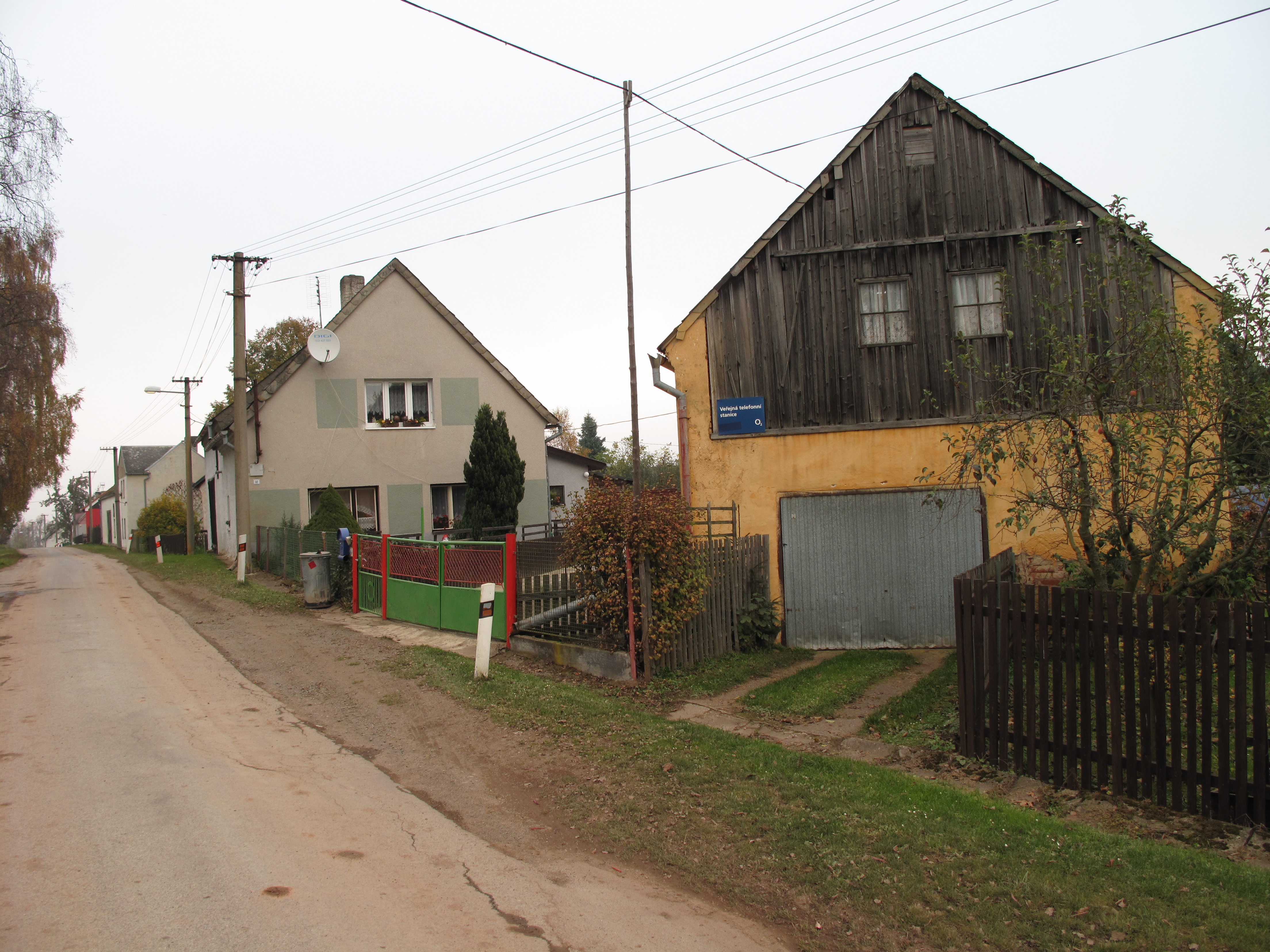 Dům v Buči. Okres Plzeň-sever, Česká republika.